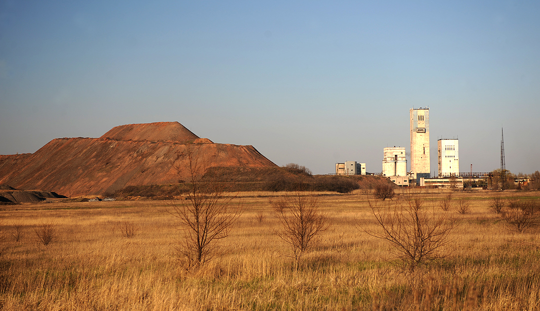 Шахта Южно Донбасская №1